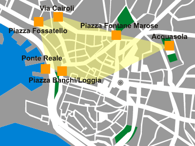 Mappa del sestiere della Maddalena - Genova